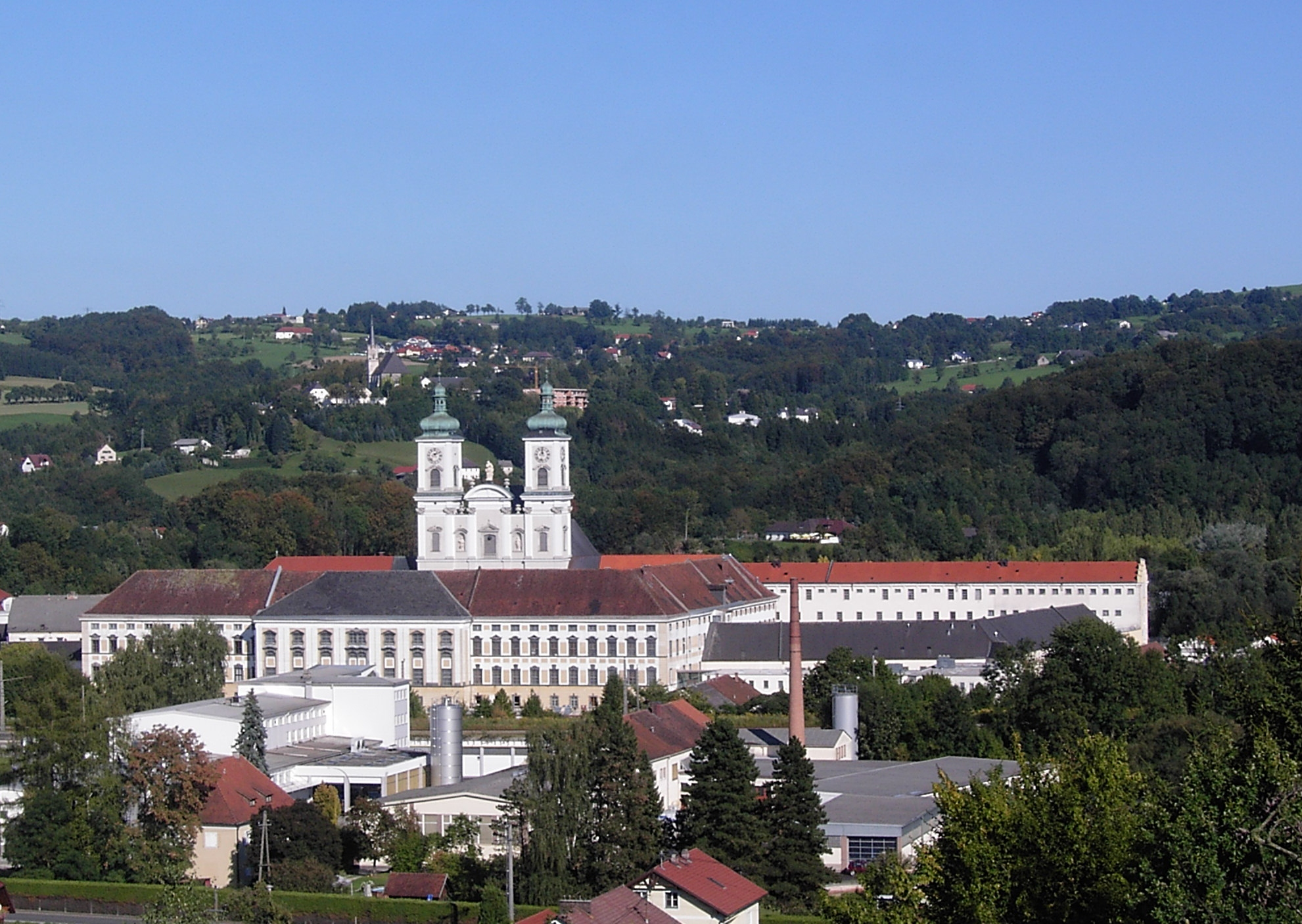 Garsten Ehem.Benediktinerkloster Am Platzl 1, Gesamtansicht von Westen